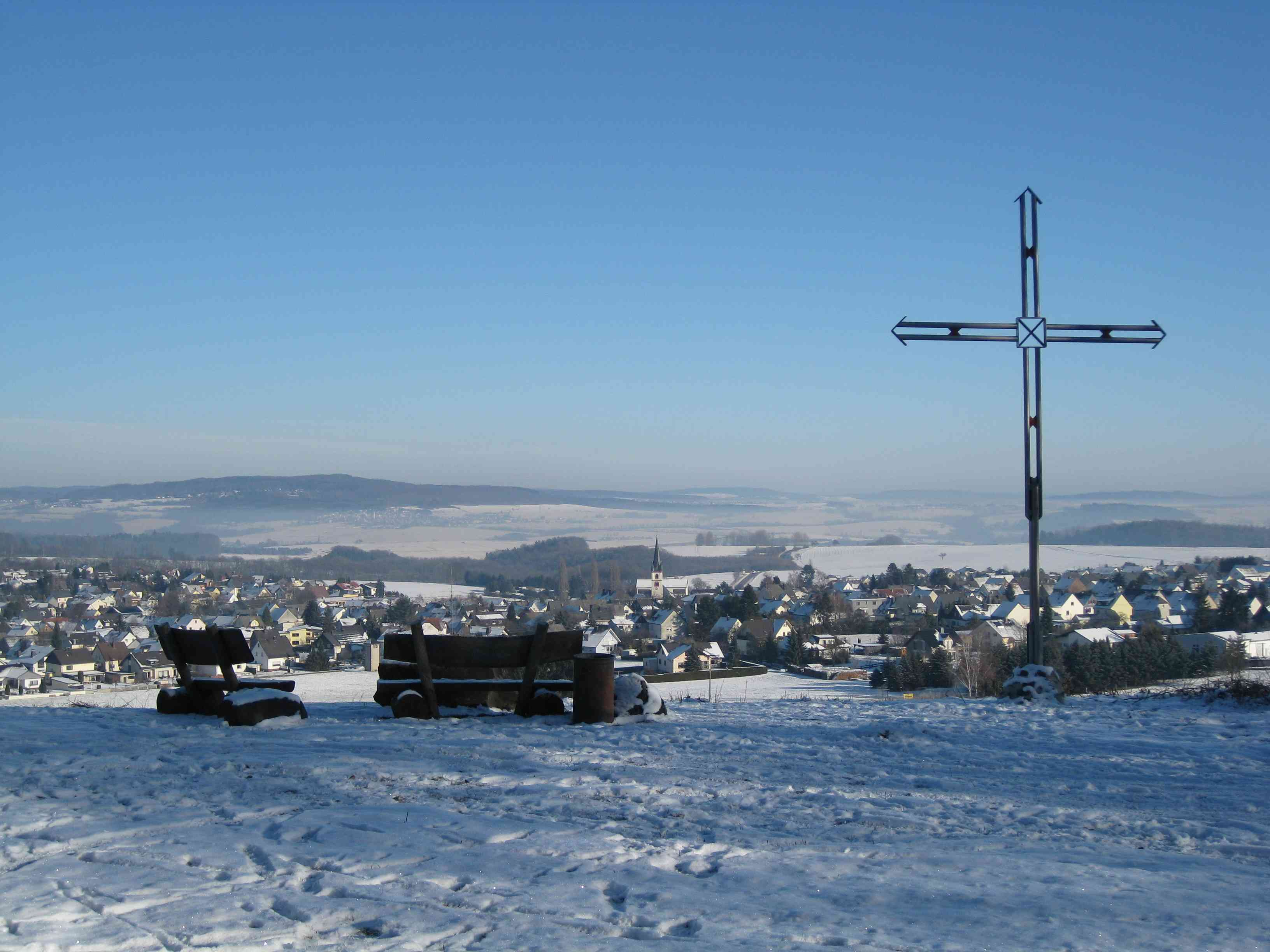 Kreuz auf dem Osterfeuerplatz auf dem Ollmersch im Westerwald